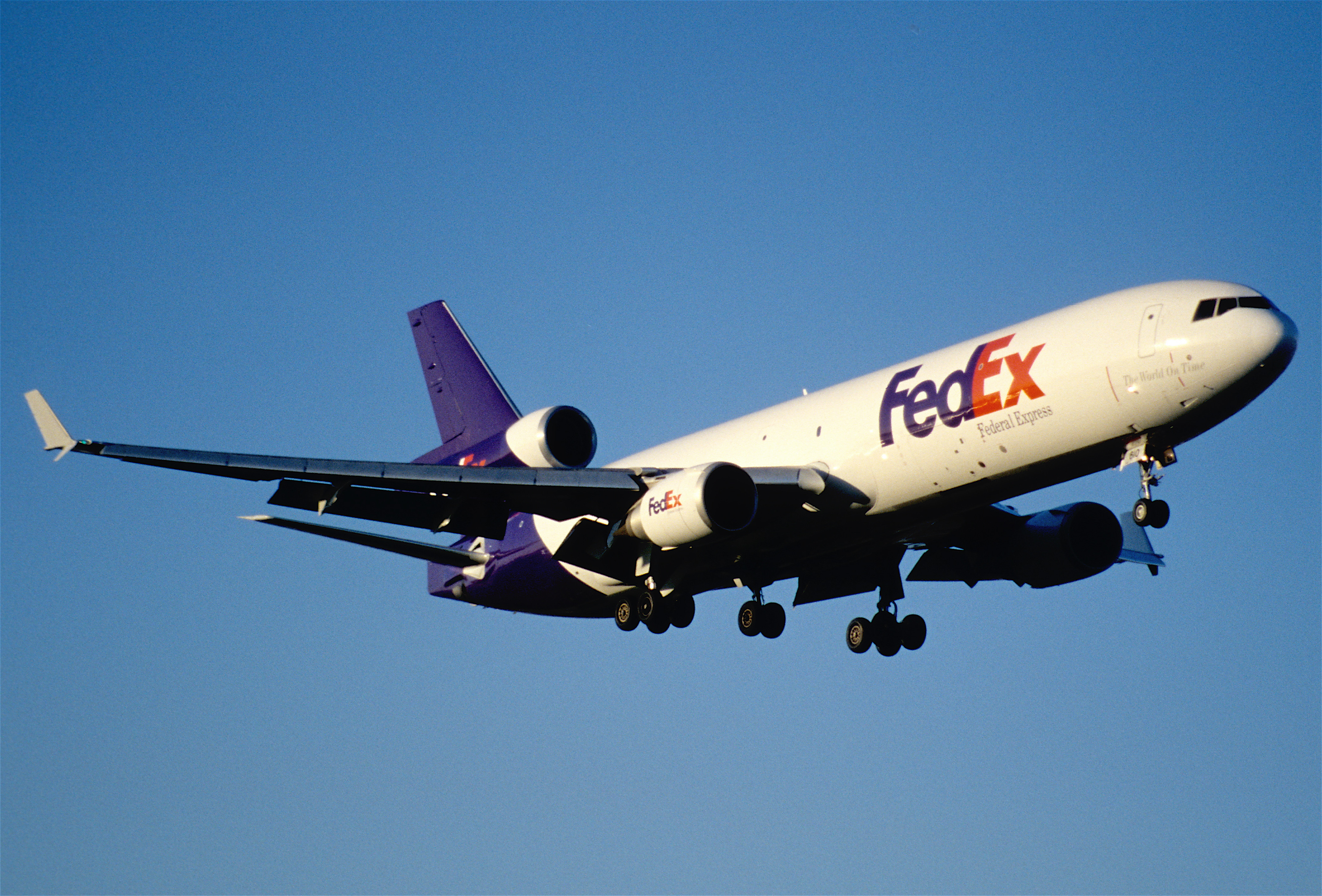 71co - FedEx MD-11F; N610FE@SYD;11.09.1999